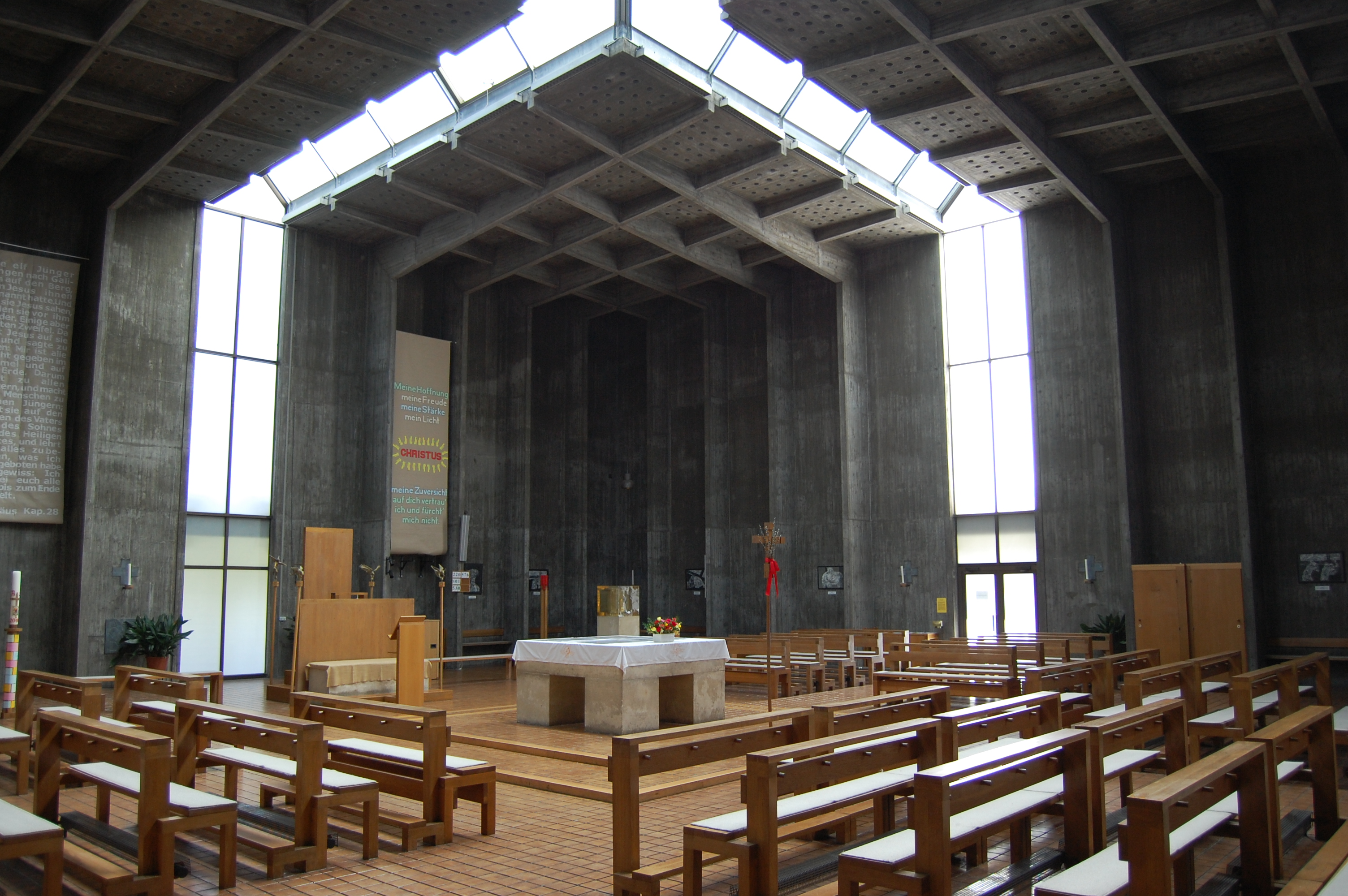 Innenraum der Oberbaumgartner Pfarrkirche in Wien, Architekt Johann Georg Gsteu